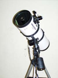 Das Meade der Sternwarte Heilbronn